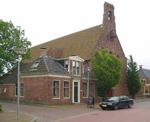 zelf gemaakt op 2/6/2005 (я!k)